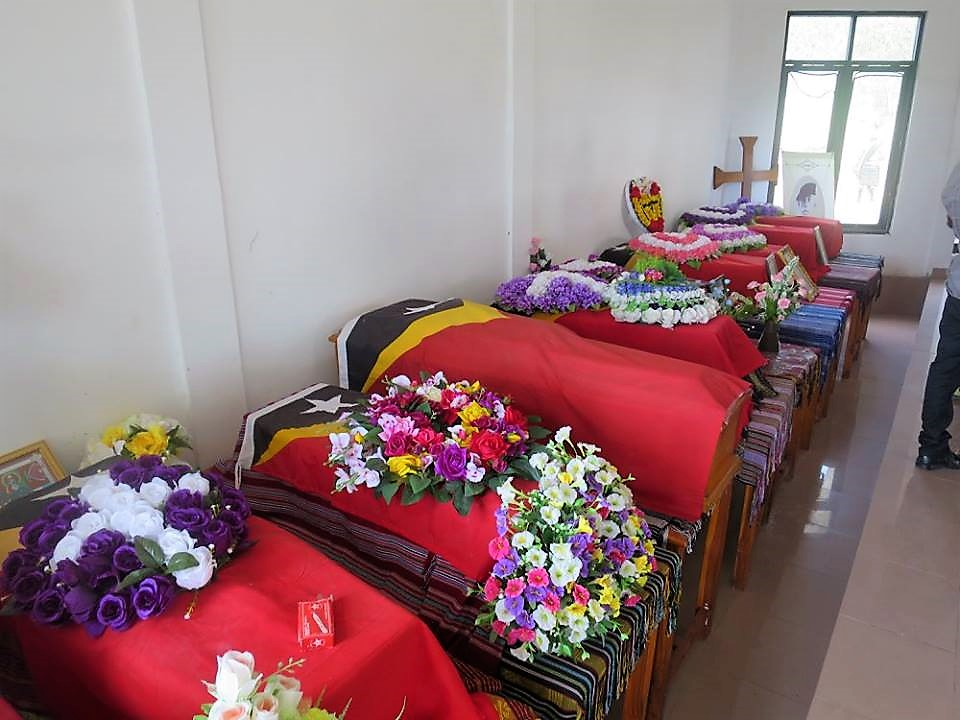 Homenagem aos Heróis e Mártires da RENETIL, Jardim dos Heróis e Martires da Pátria em Metinaro